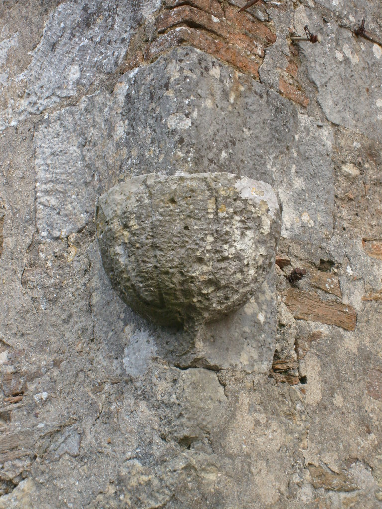 Coquille de Saint-Jacques sculptée sur l'angle du manoir de la Mortière rappelant le passage d'un ancien chemin de Compostelle.